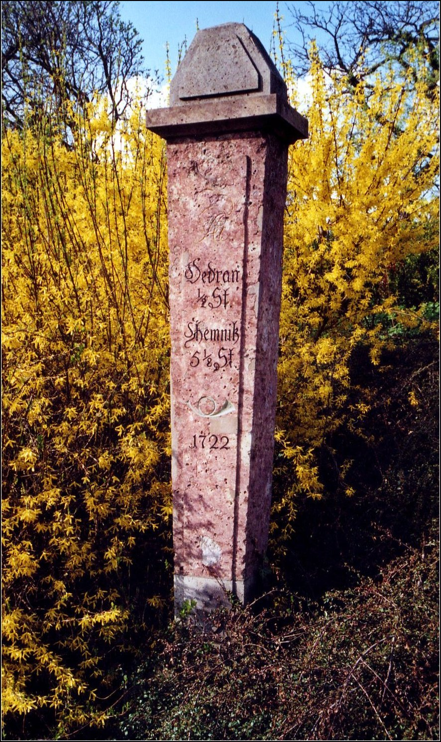 Oederan: Halbmeilensäule (1722) der ehemaligen Poststraße Dresden-Hof.